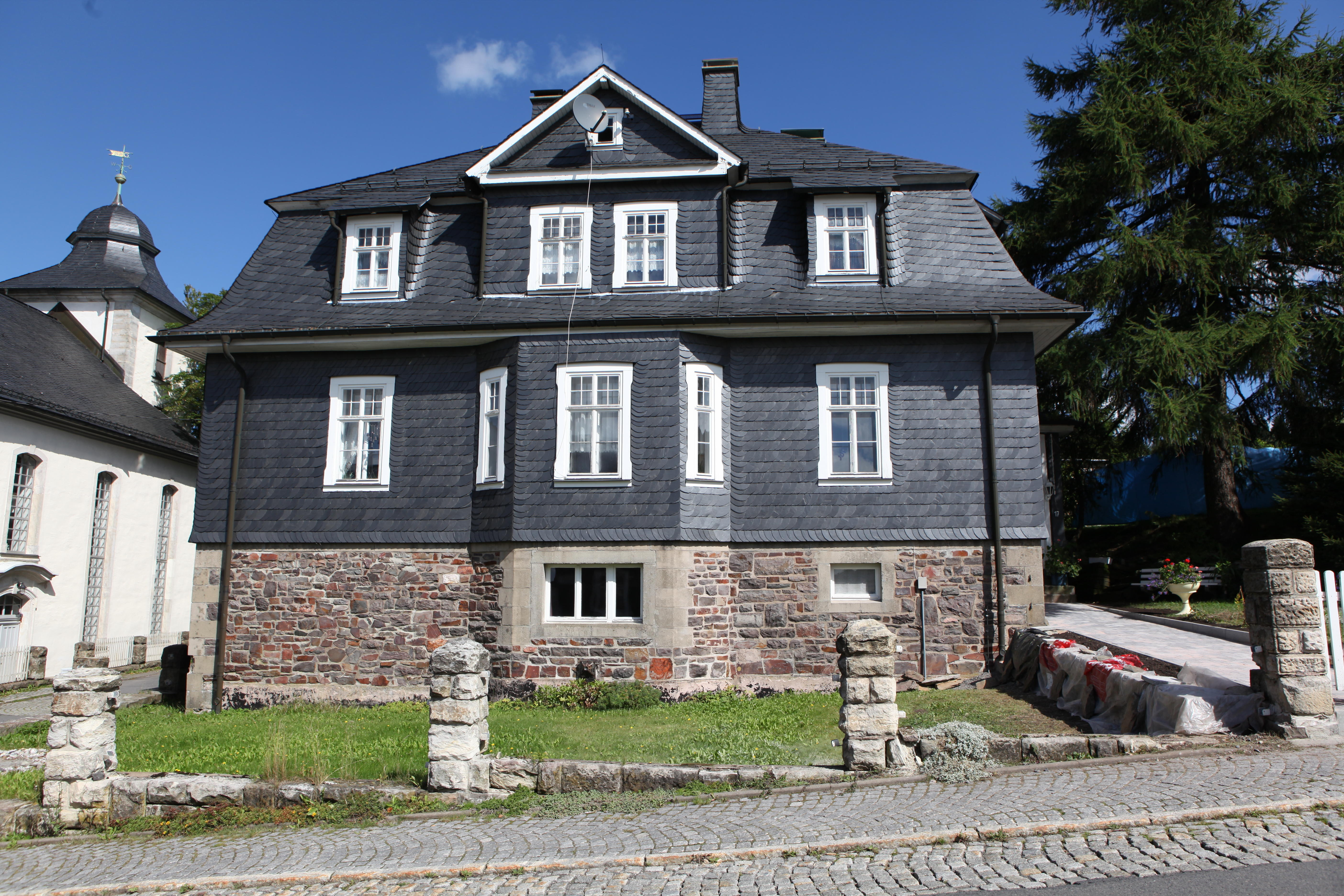 Pfarrhaus der ev.-luth. Kirchgemeinde, 1915, Steinheid, Hohewartstraße 17